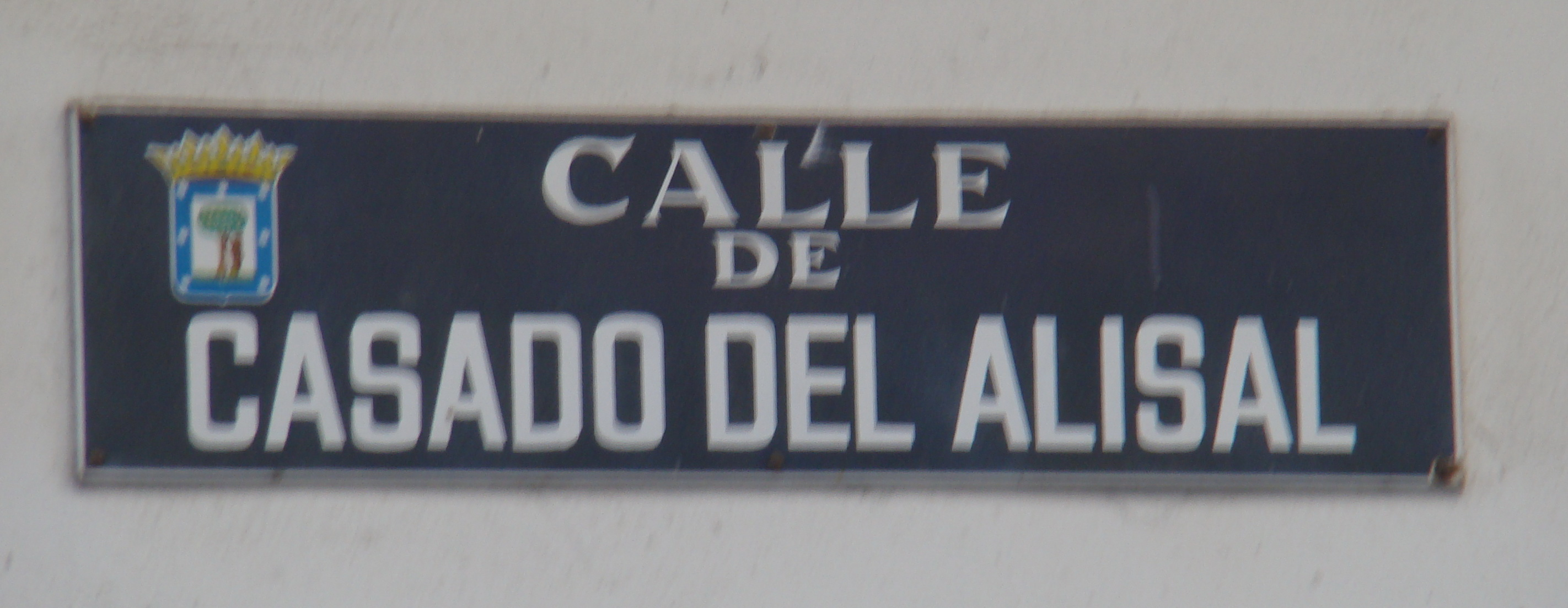 Madrid, España. Calle de Casado del Alistal.